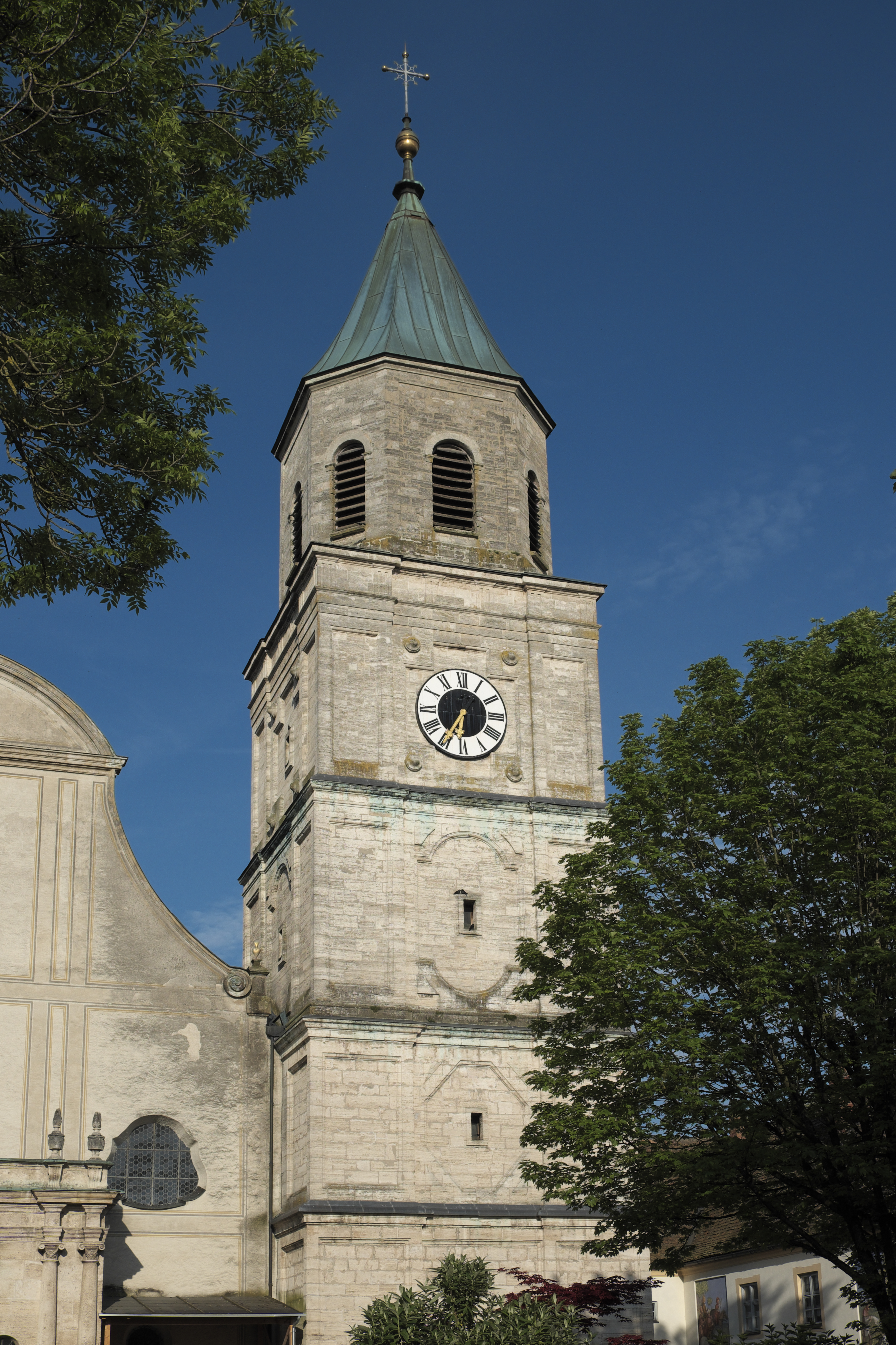 Kirche Heilig Kreuz des ehemaligen Augustinerchorherrenstifts in Polling im Landkreis Weilheim-Schongau (Bayern/Deutschland), Kirchturm